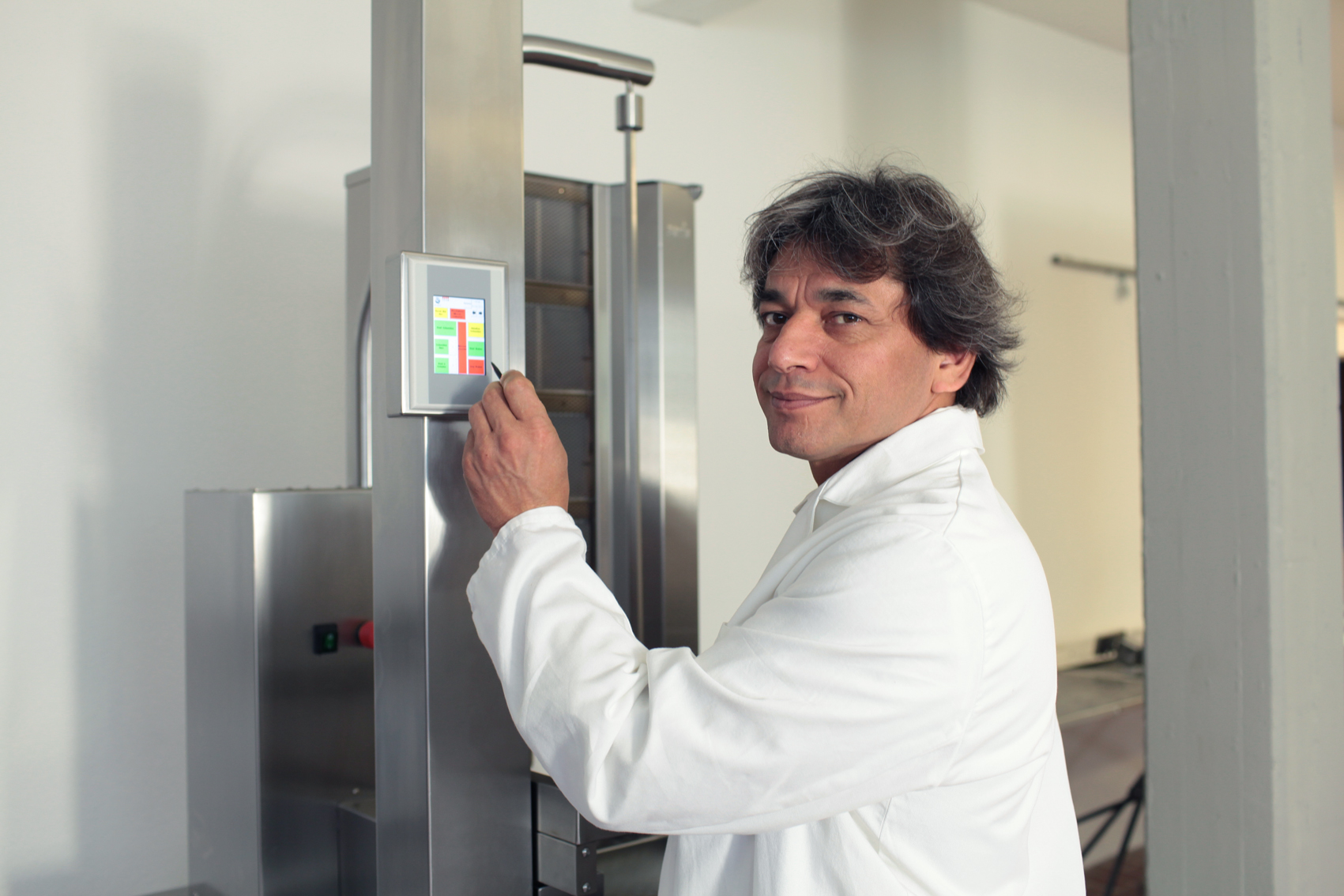 ALKADUR RobotSystems GmbH -Herr Duran Kabakyer (CEO)